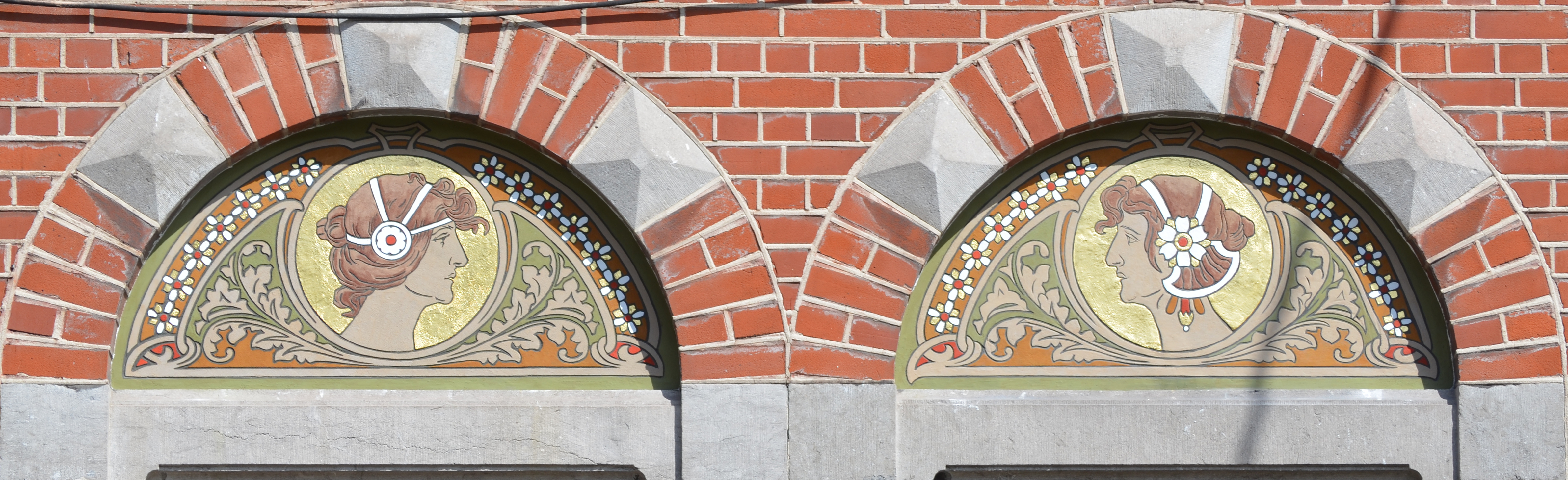 Marcinelle (Charleroi-Belgique) - rue du Basson 26 - sgraffites Art nouveau realisés en 1901 par Gabriel Van Dievoet. État de l'œuvre après la restauration réalisée en mai-juin 2018 par Elvira Iozzi de la société Ikonos.